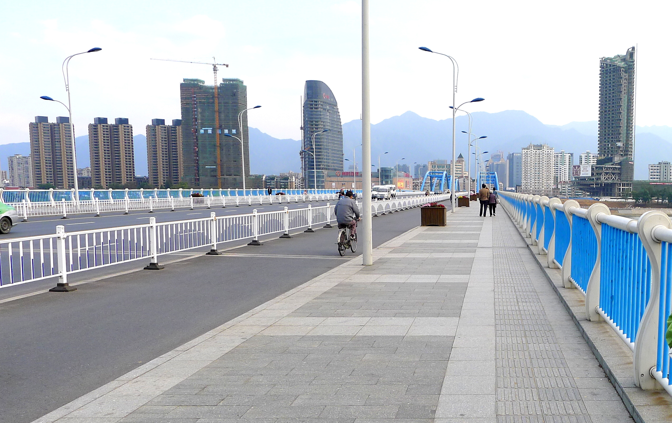 中文（中国大陆）: 浙江桐庐县